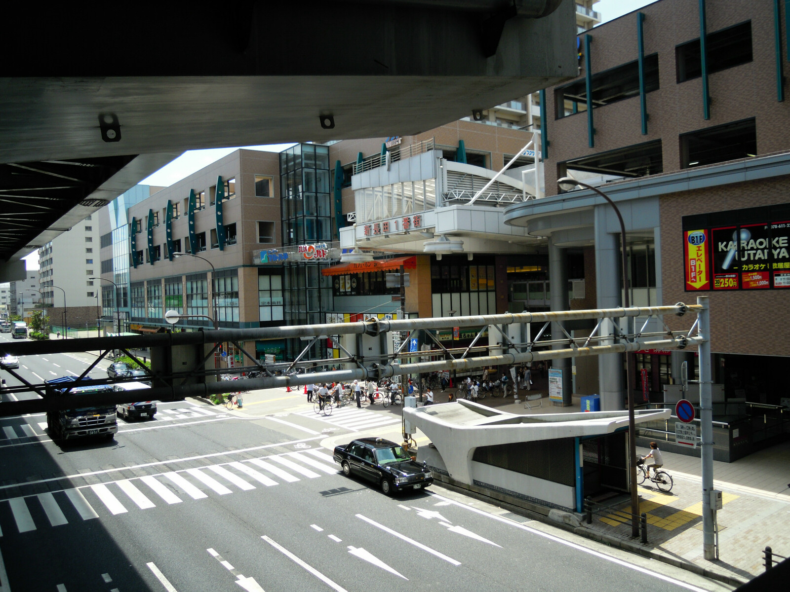 Udezukacho